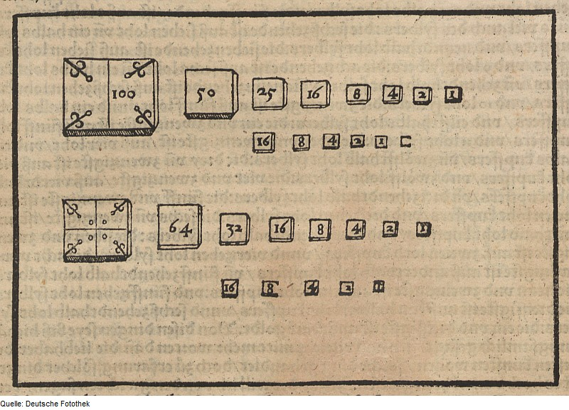 Original image description from the Deutsche Fotothek Bergwerk & Bergbau & Metallurgie & Probiergewicht